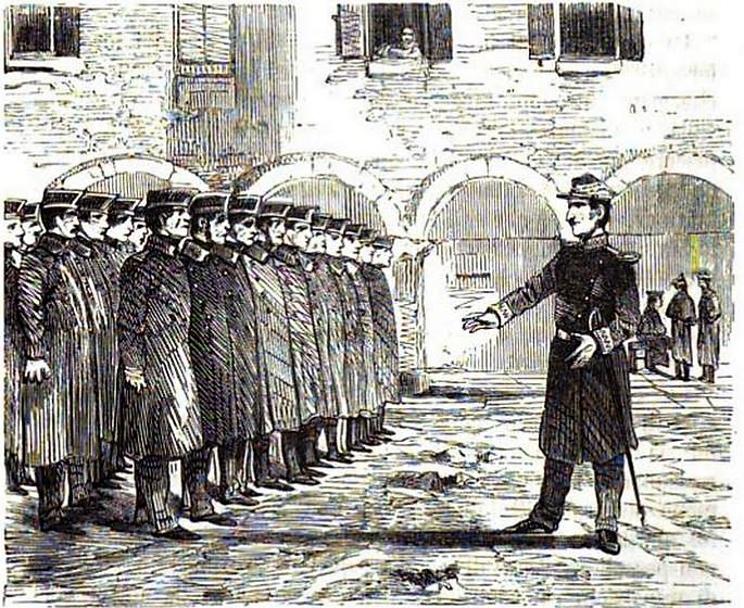 disegno Francesco II parla alle sue truppe